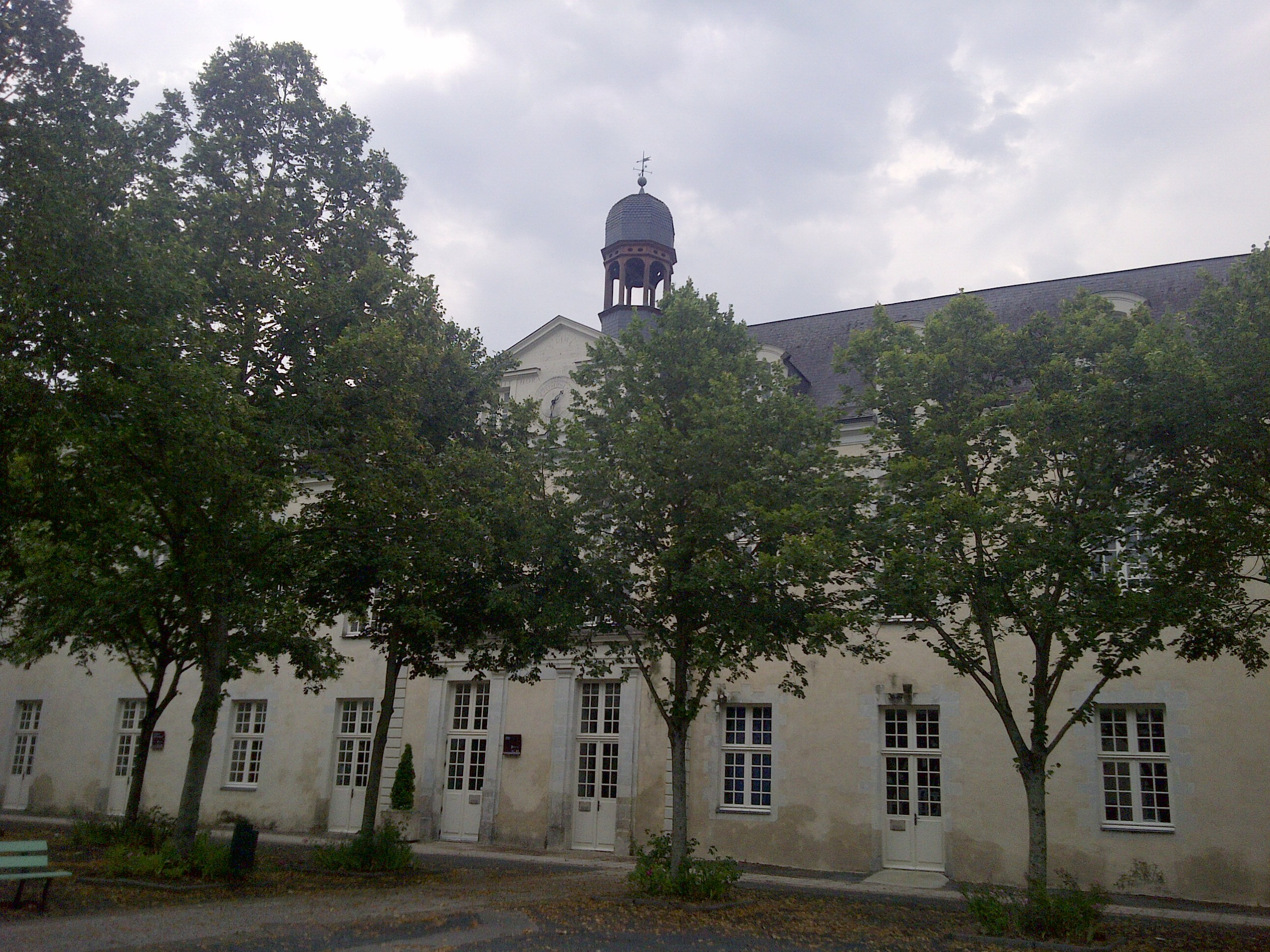 lycée Victor-Hugo de Château-Gontier, façade du bâtiment de l'horloge.